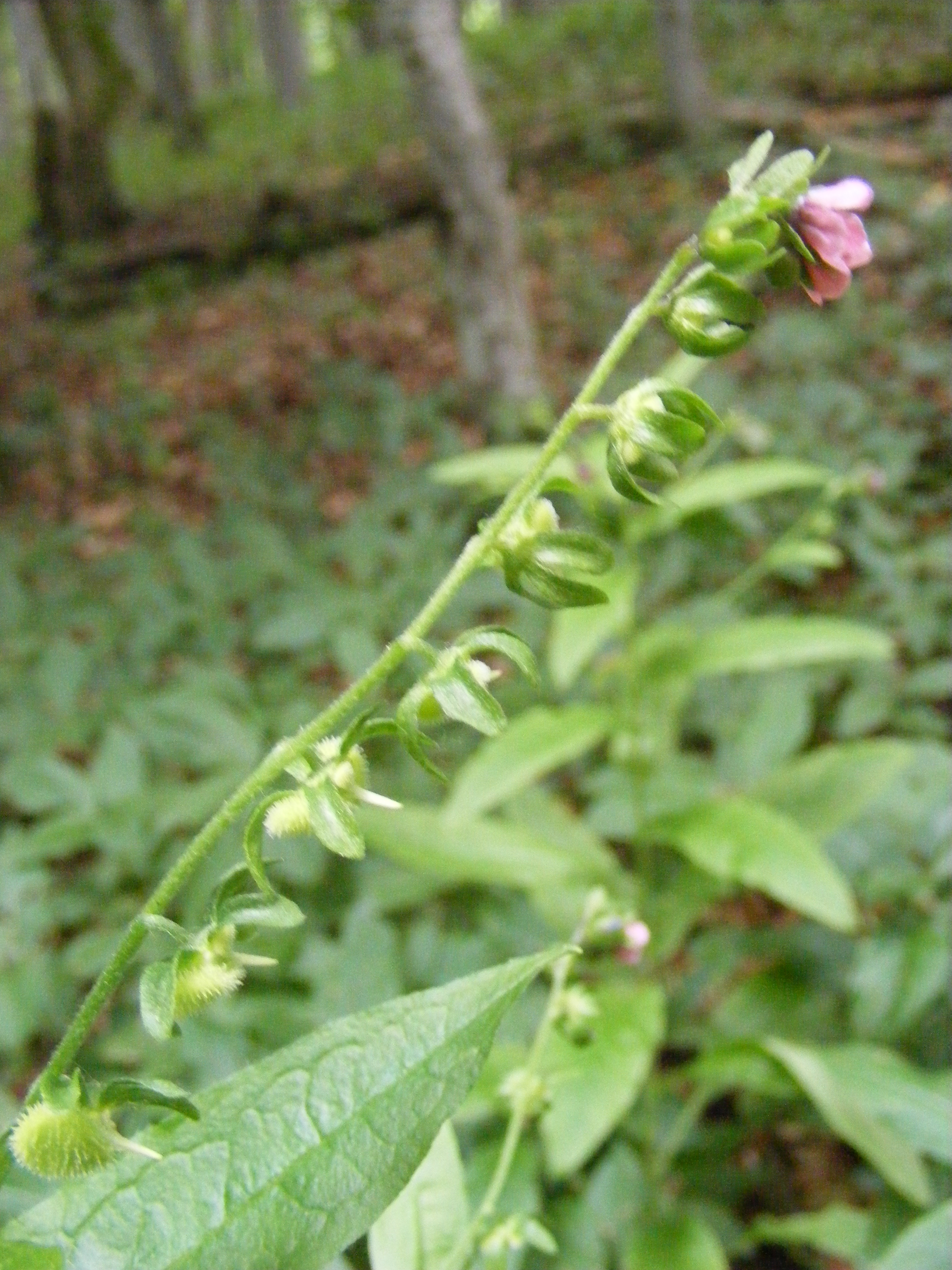 Boshondstong